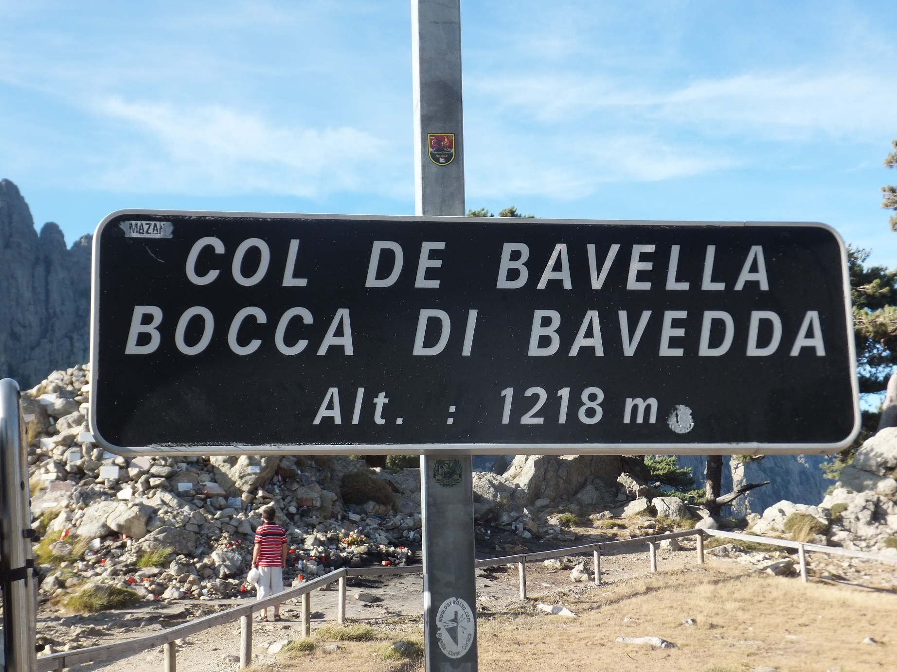 Bavella Col de Bavella 2014